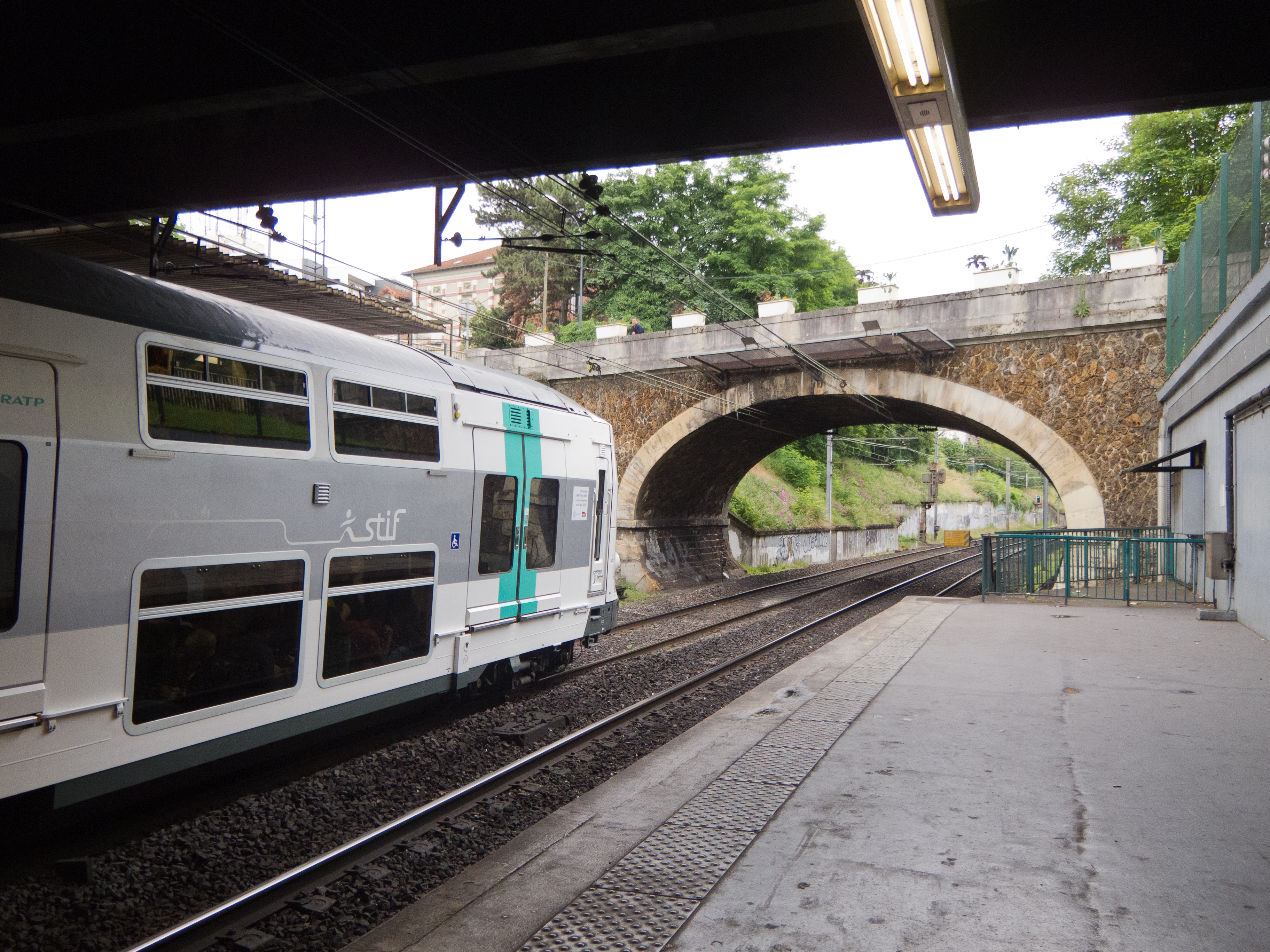 Gare RER de Fontenay-sous-Bois (RER A) - Rame MI09 - Val-de-Marne, France